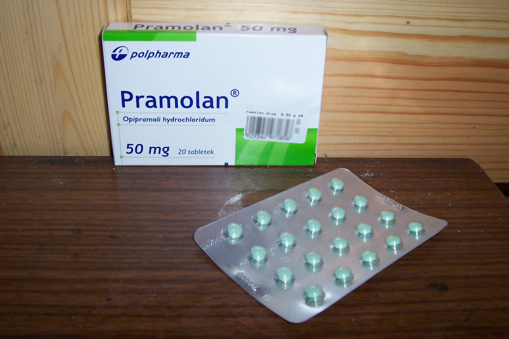 Pramolan pills